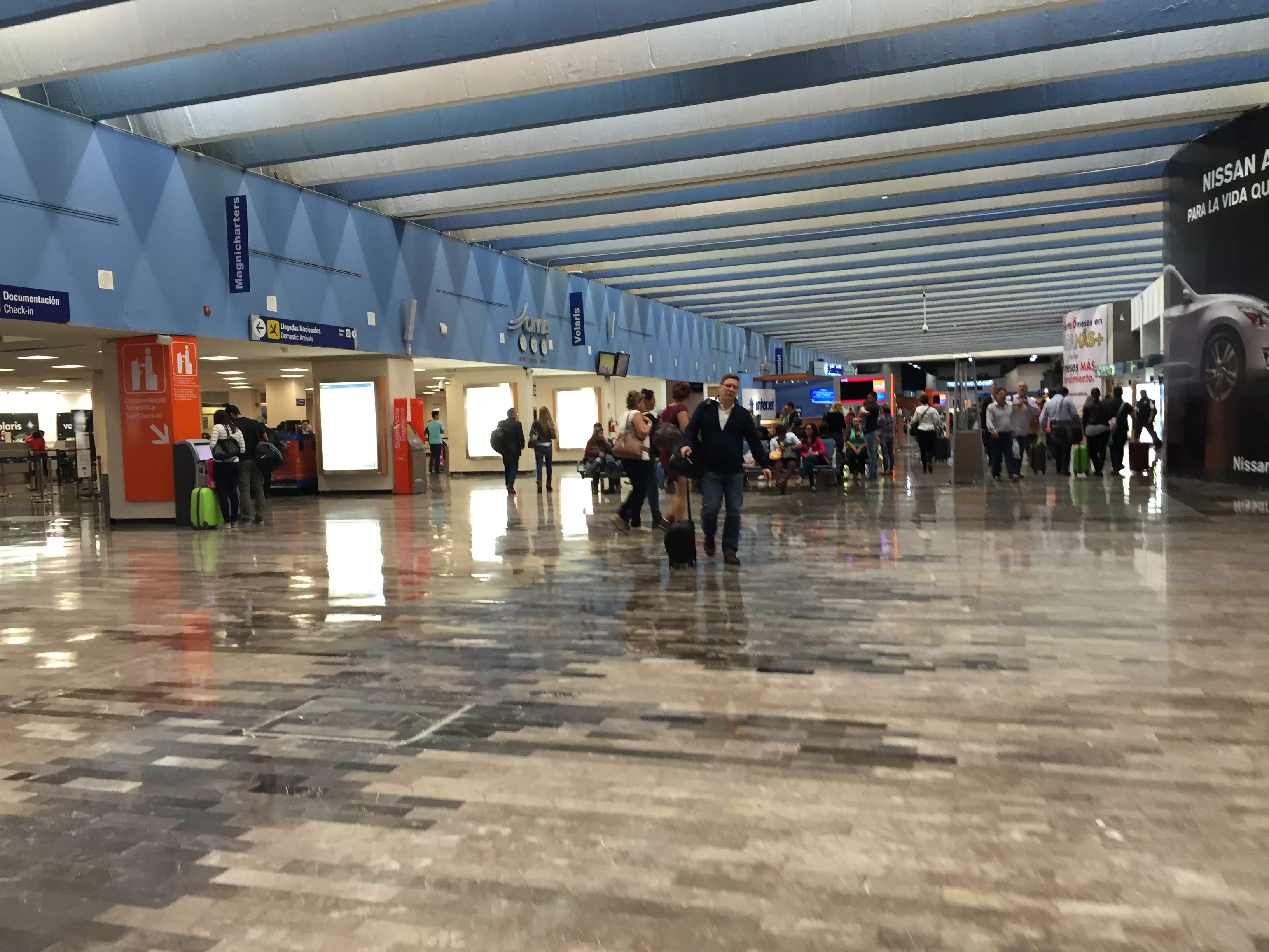 Pasillo del Aeropuerto Internacional de Monterrey.